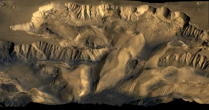 Каньоны Офир и Кандор на Марсе Каньоны Офир и Кандор на Марсе, составной снимок Викинга